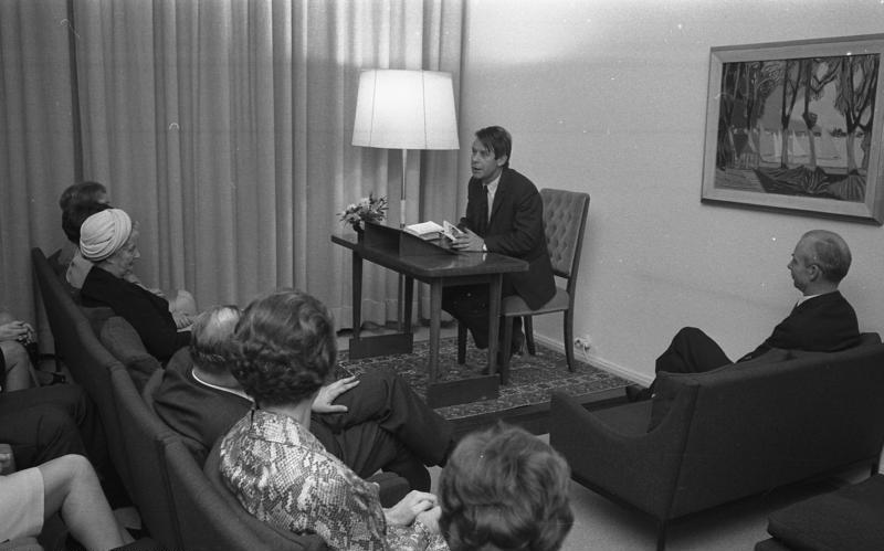 Dichterlesung Siegfried Lenz in der Landesvertr. Hamburg